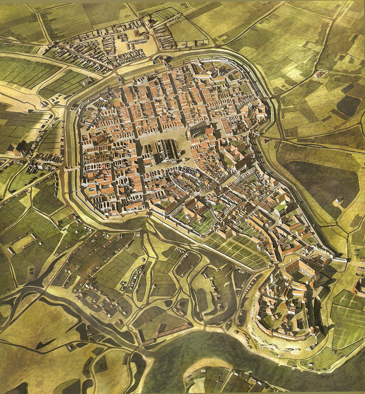 Widok Krakowa z około połowy XVII wieku